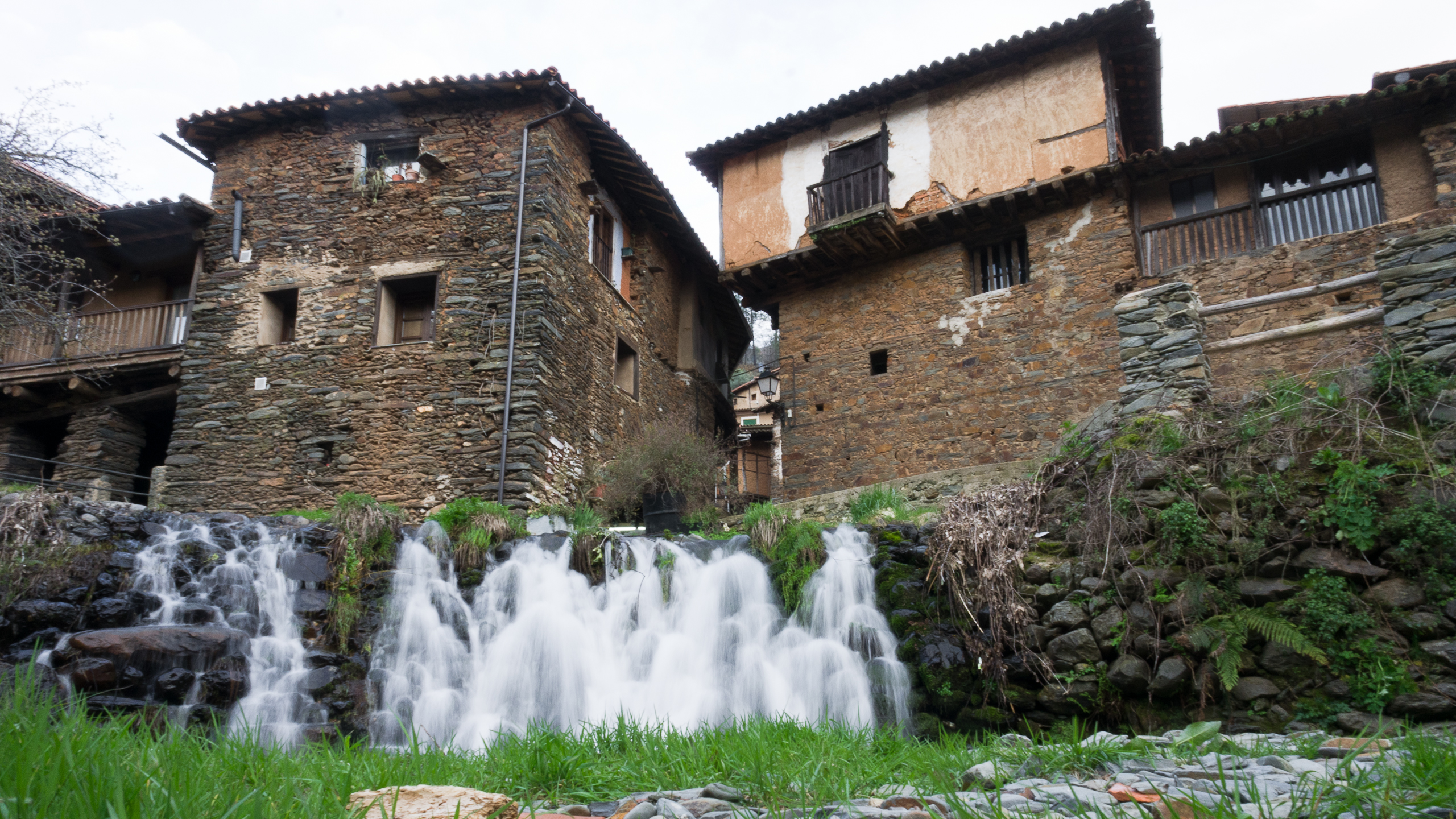 Robledillo de Gata, Cáceres - Extremadura